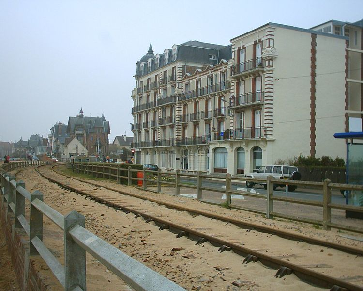 Hotel Imbert, Houlgate in 2005.